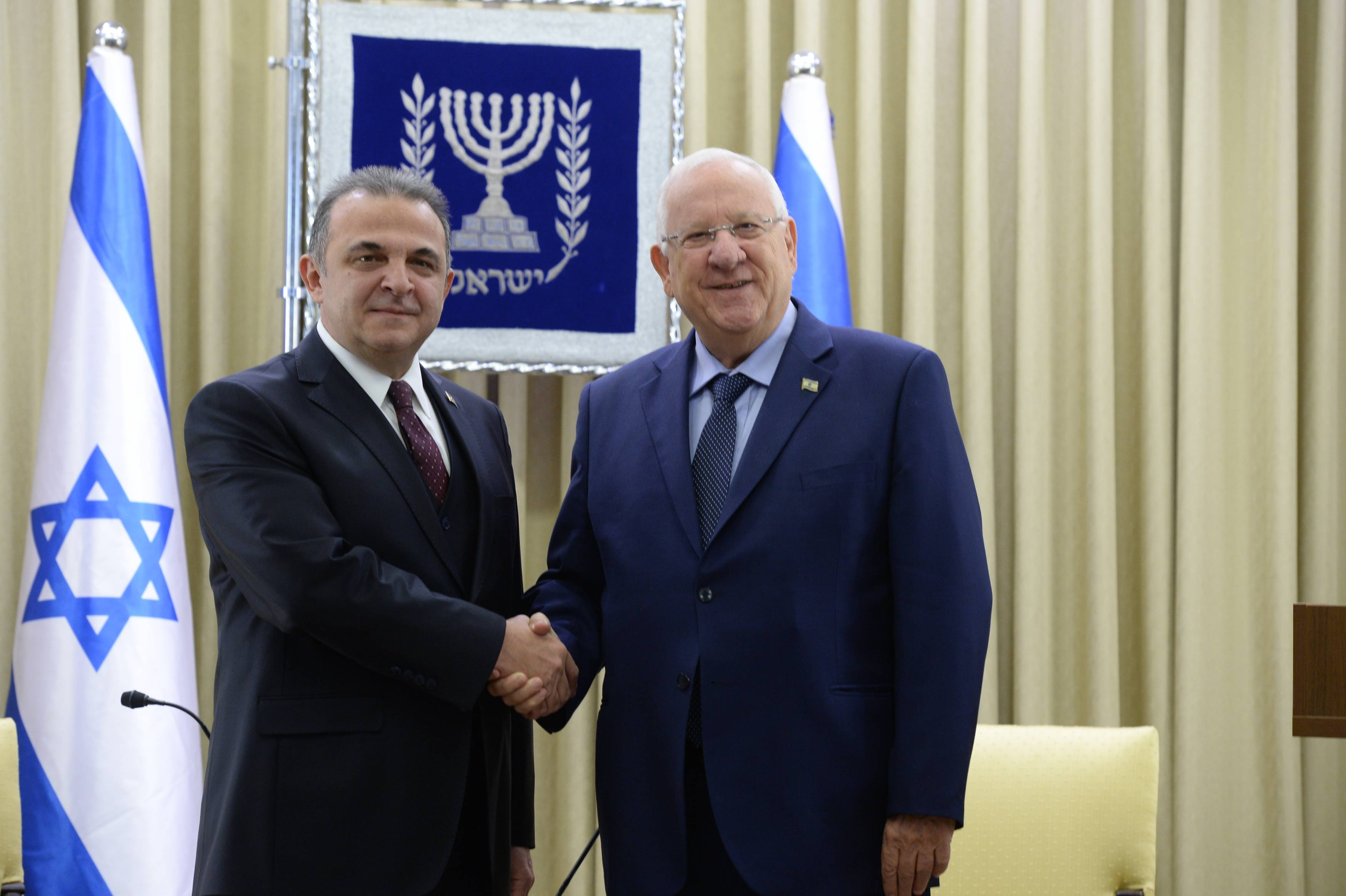 שגריר טורקיה בישראל כאמל אוקום מגיש את כתב האמנתו לנשיא מדינת ישראל ראובן ריבלין